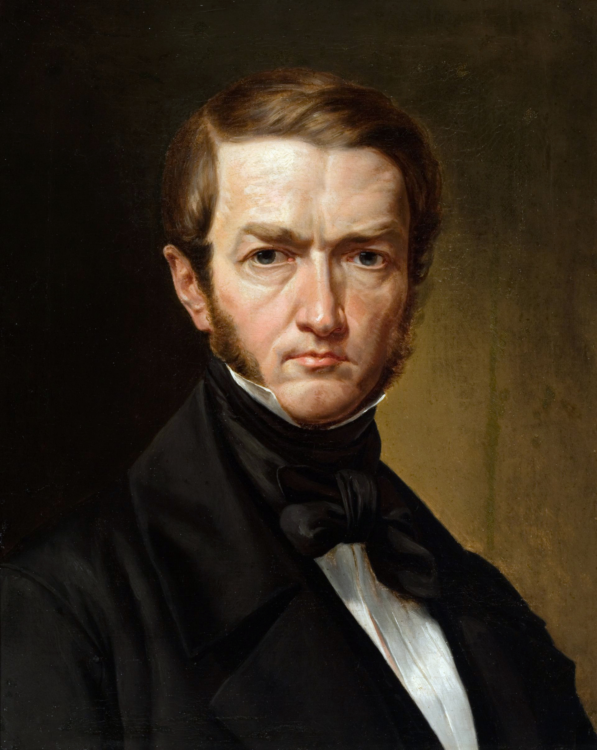 Беларуская (тарашкевіца): Канут Русецкі (Kanut Rusiecki). Аўтапартрэт